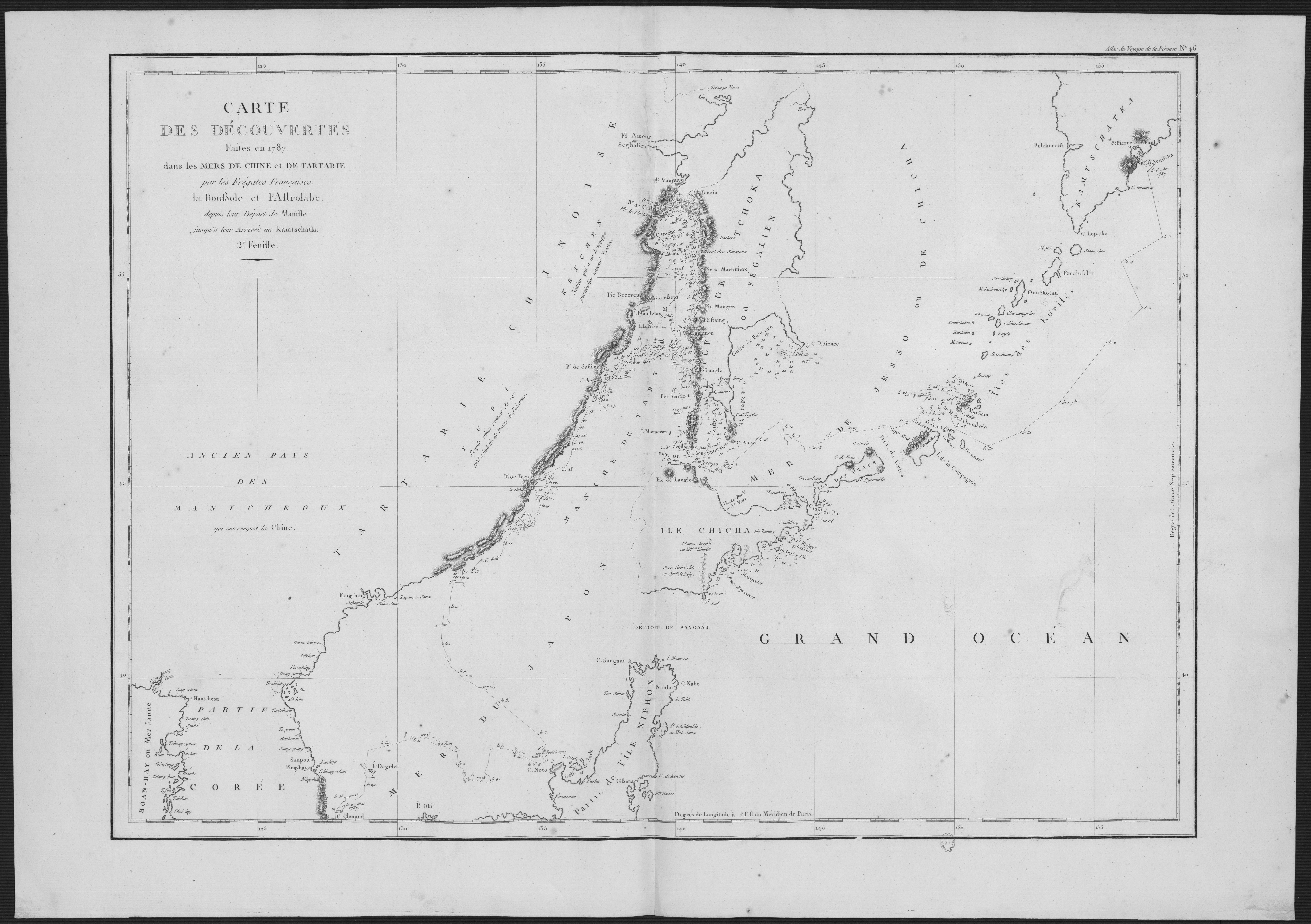 Atlas du voyage de La Pérouse